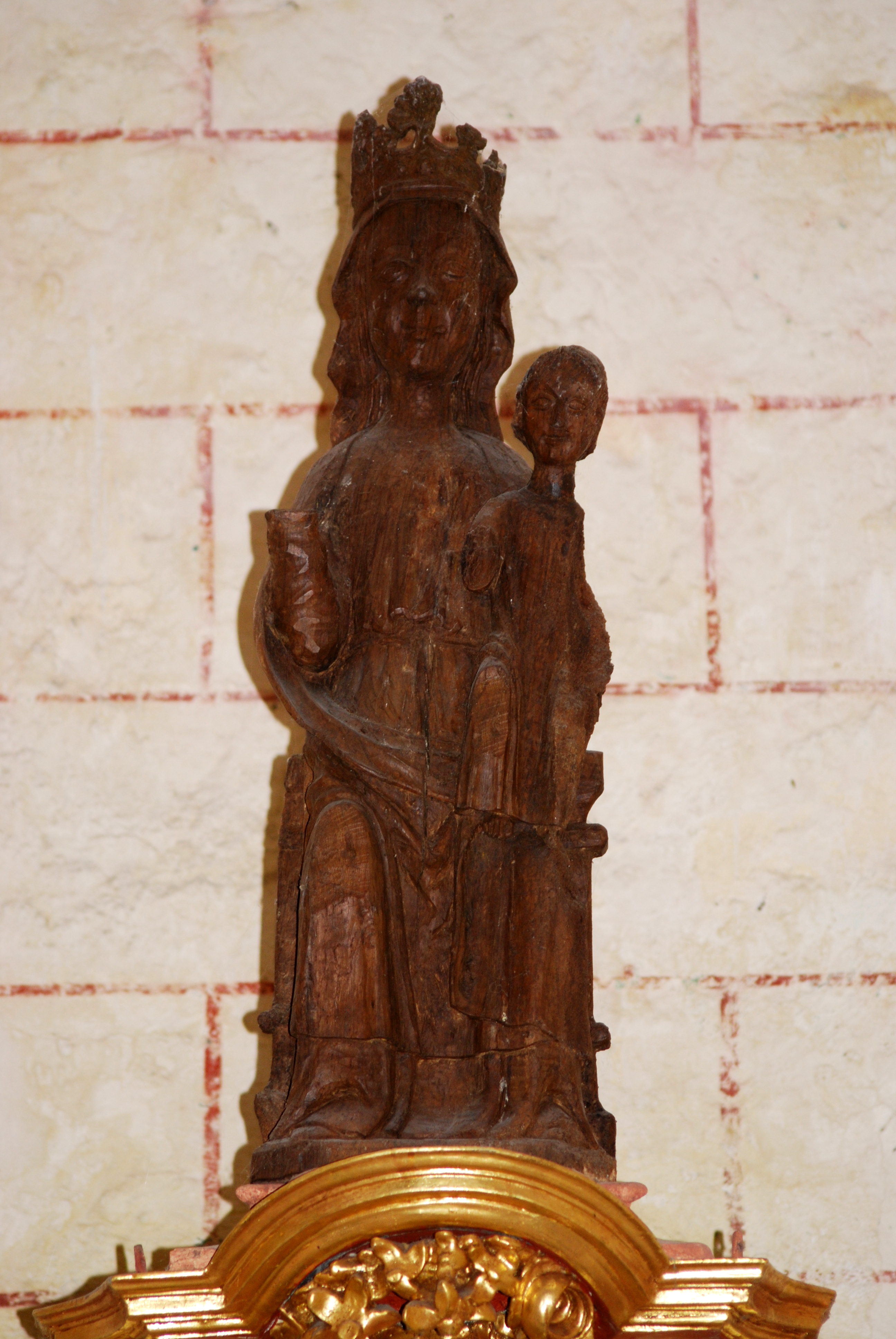 Église de Saint-Genès-de-Lombaud